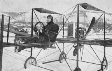 Pfitzner Sándor monoplánja, az első egysíkú gép Amerikában